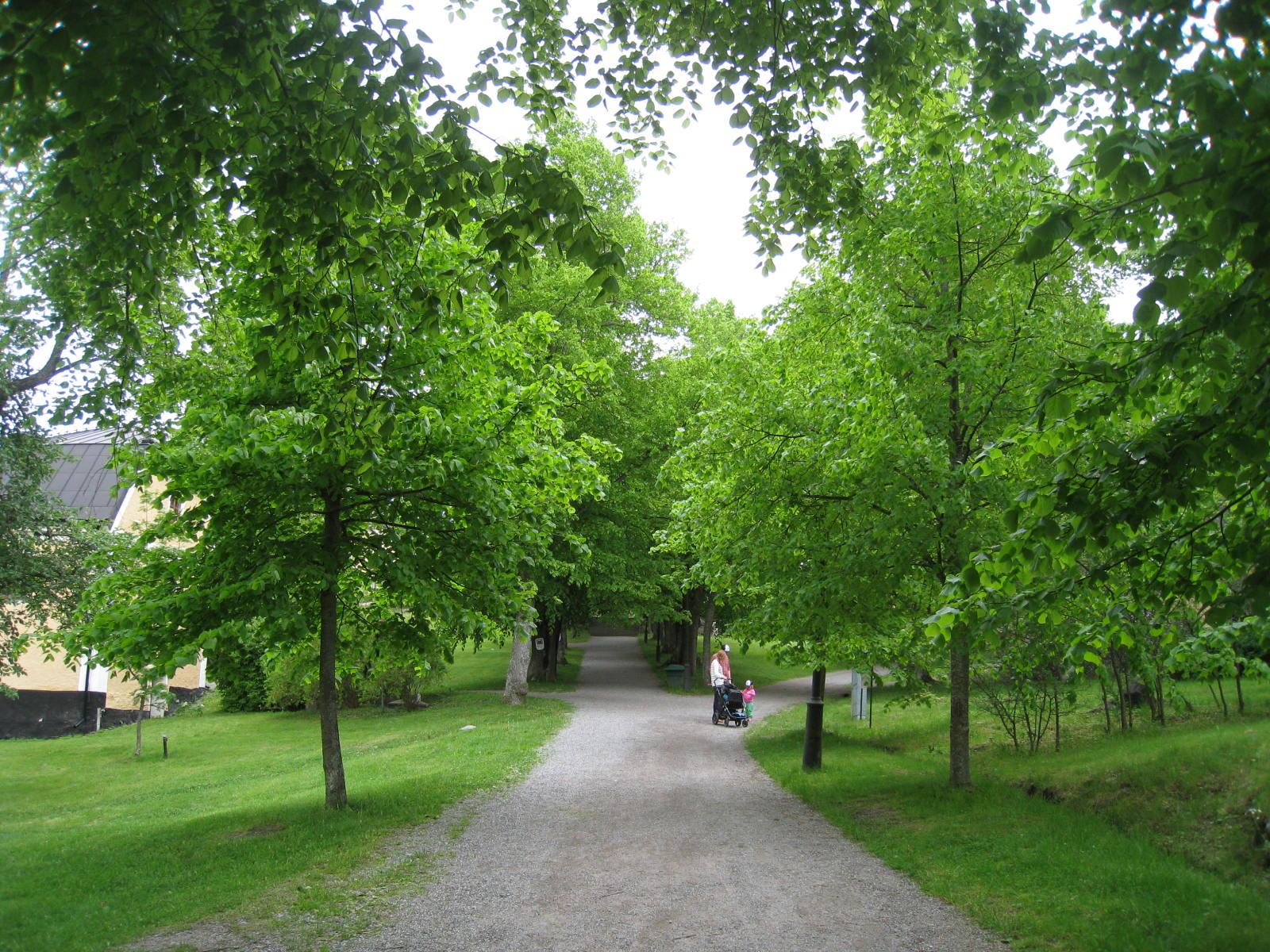 Görvälns slottspark i Järfälla kommun.